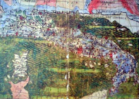 Una carta geografica